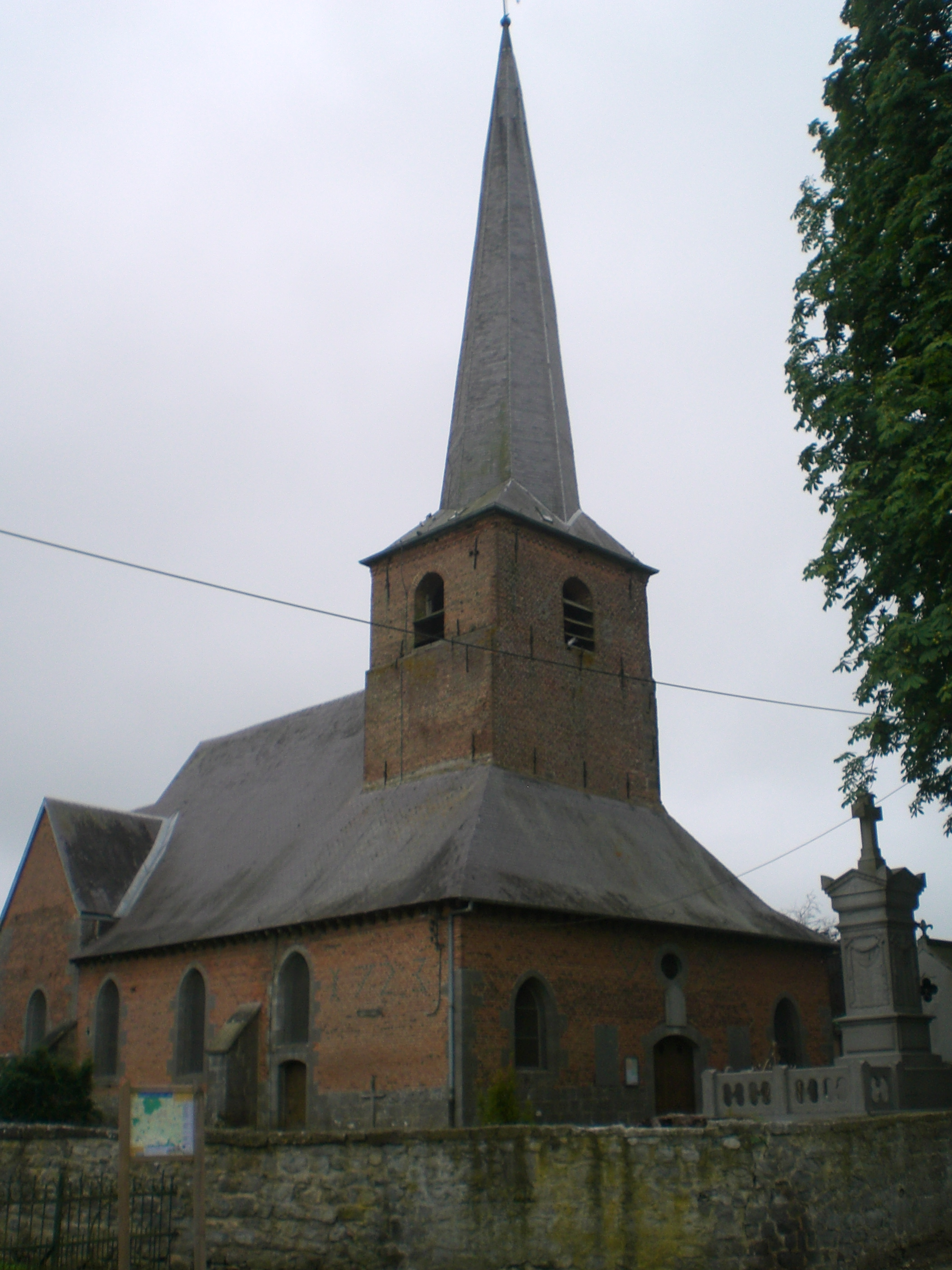 eglise de Grand-Fayt nord france